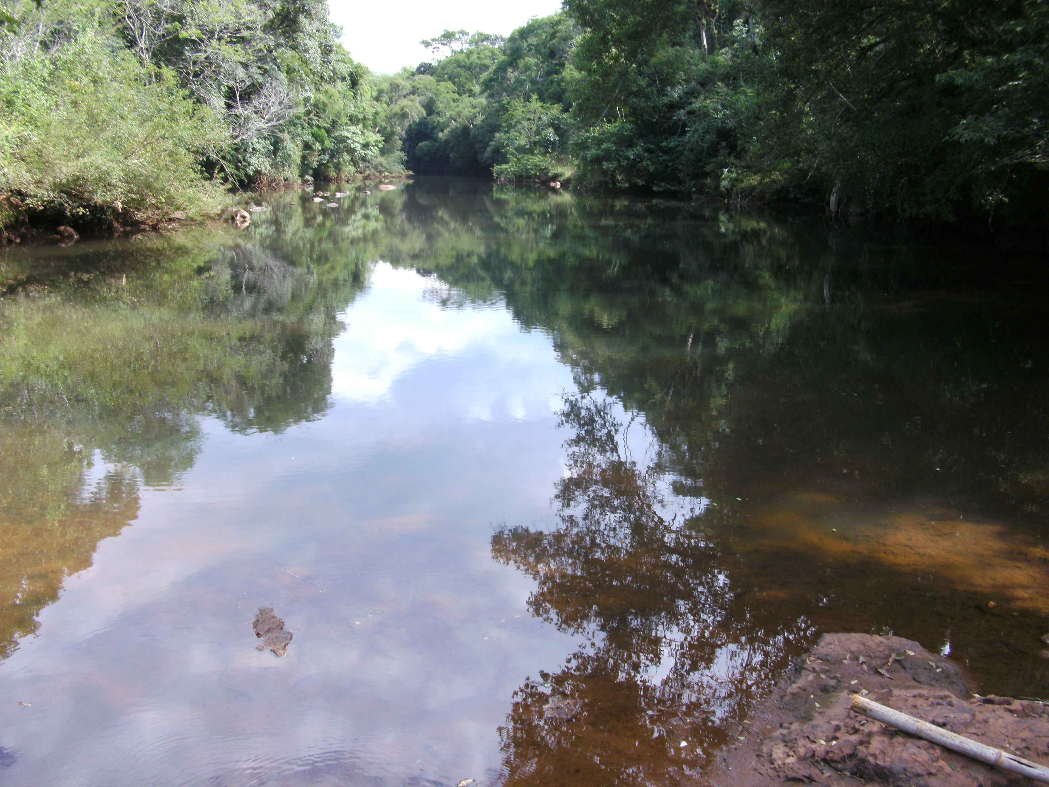 Rio Cafundó